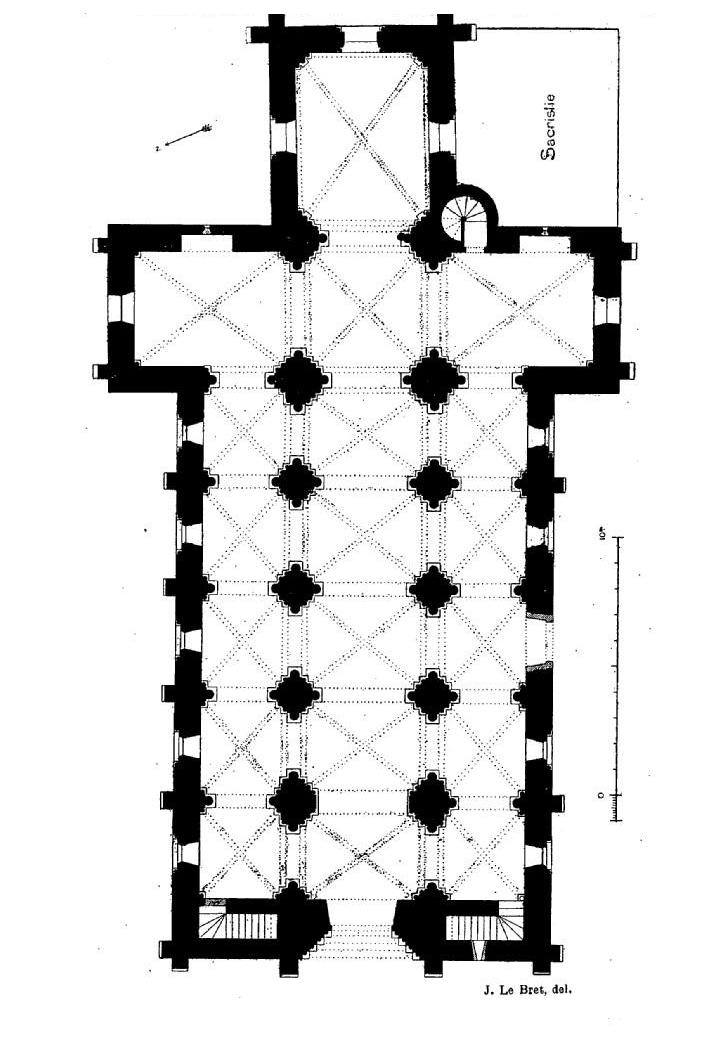 Plan de l'église Notre-Dame-de-la-Nativité de Lavilletertre.